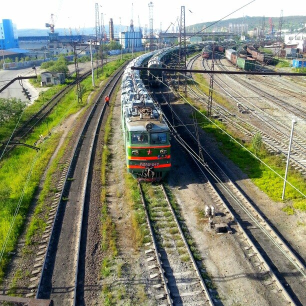 Август 2014